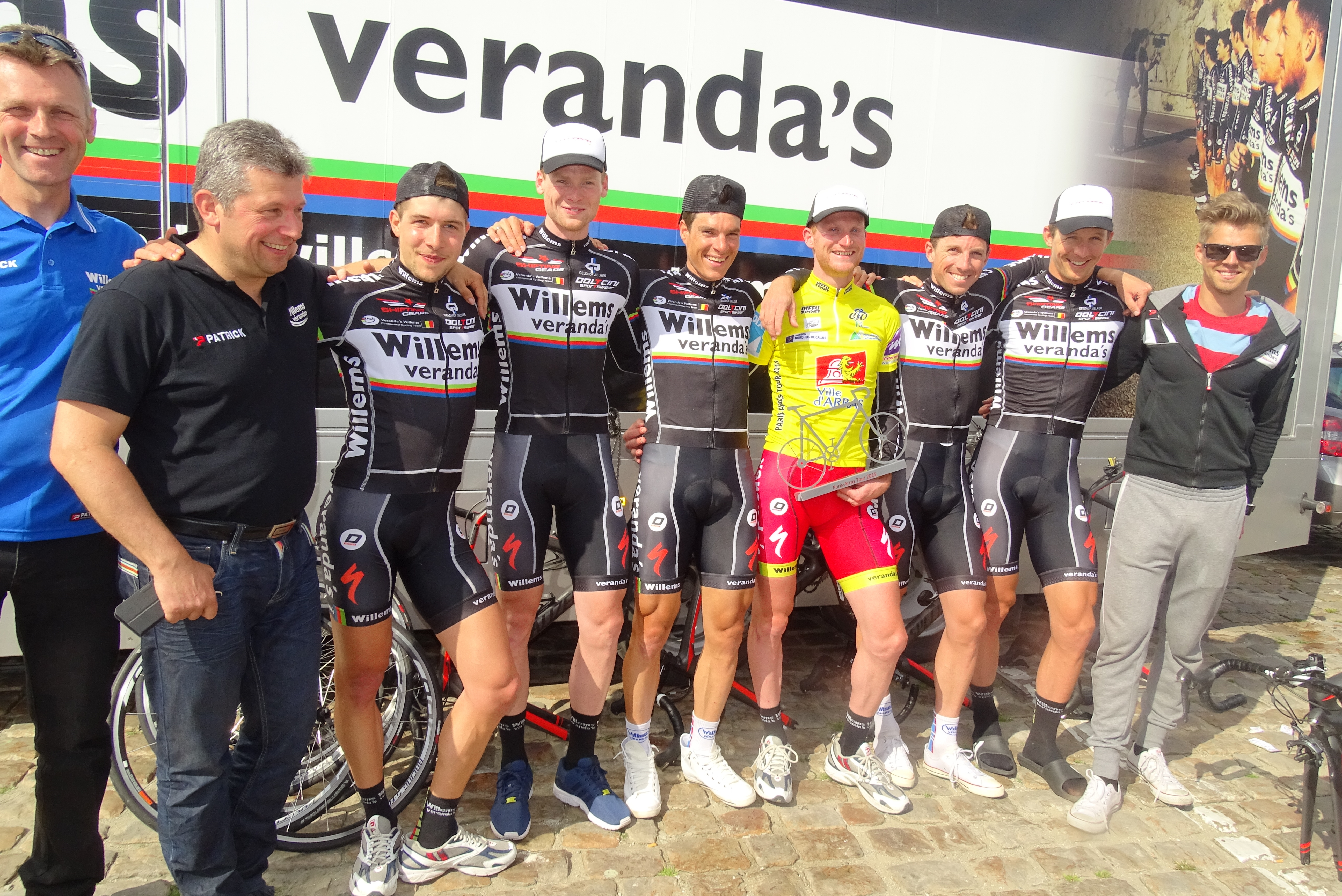 Reportage réalisé le dimanche 24 mai 2015 à l'occasion du départ et de l'arrivée de la troisième étape du Paris-Arras Tour 2015 à Arras, Pas-de-Calais, Nord-Pas-de-Calais, France.